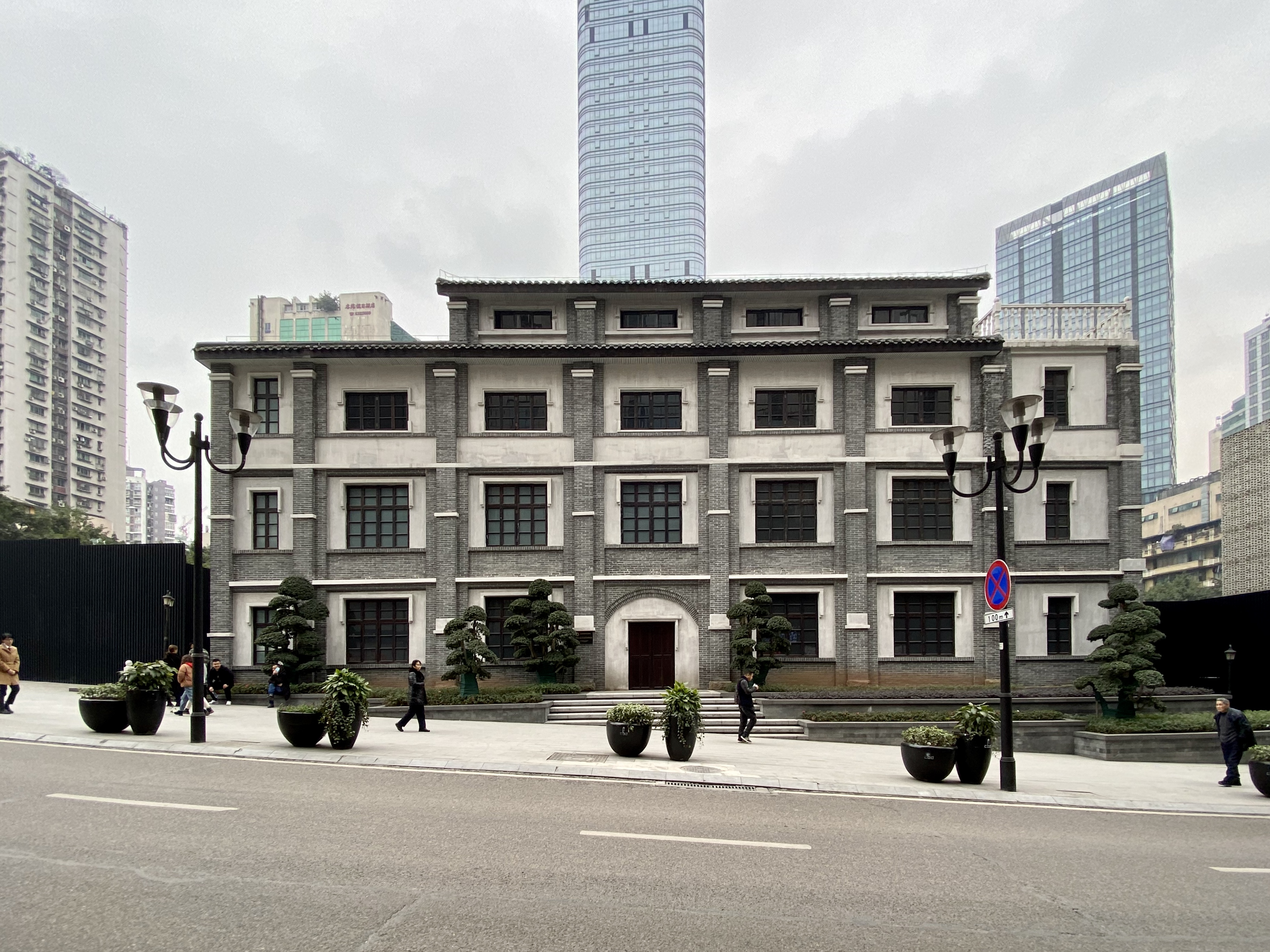 中文（中国大陆）: 韩国光复军总司令部旧址（广角）